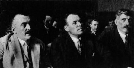 Sojenje Puniši Račiću. Od leve :Puniša Račič, Jovanovič Luna, Toma Popovič na založni klopi.